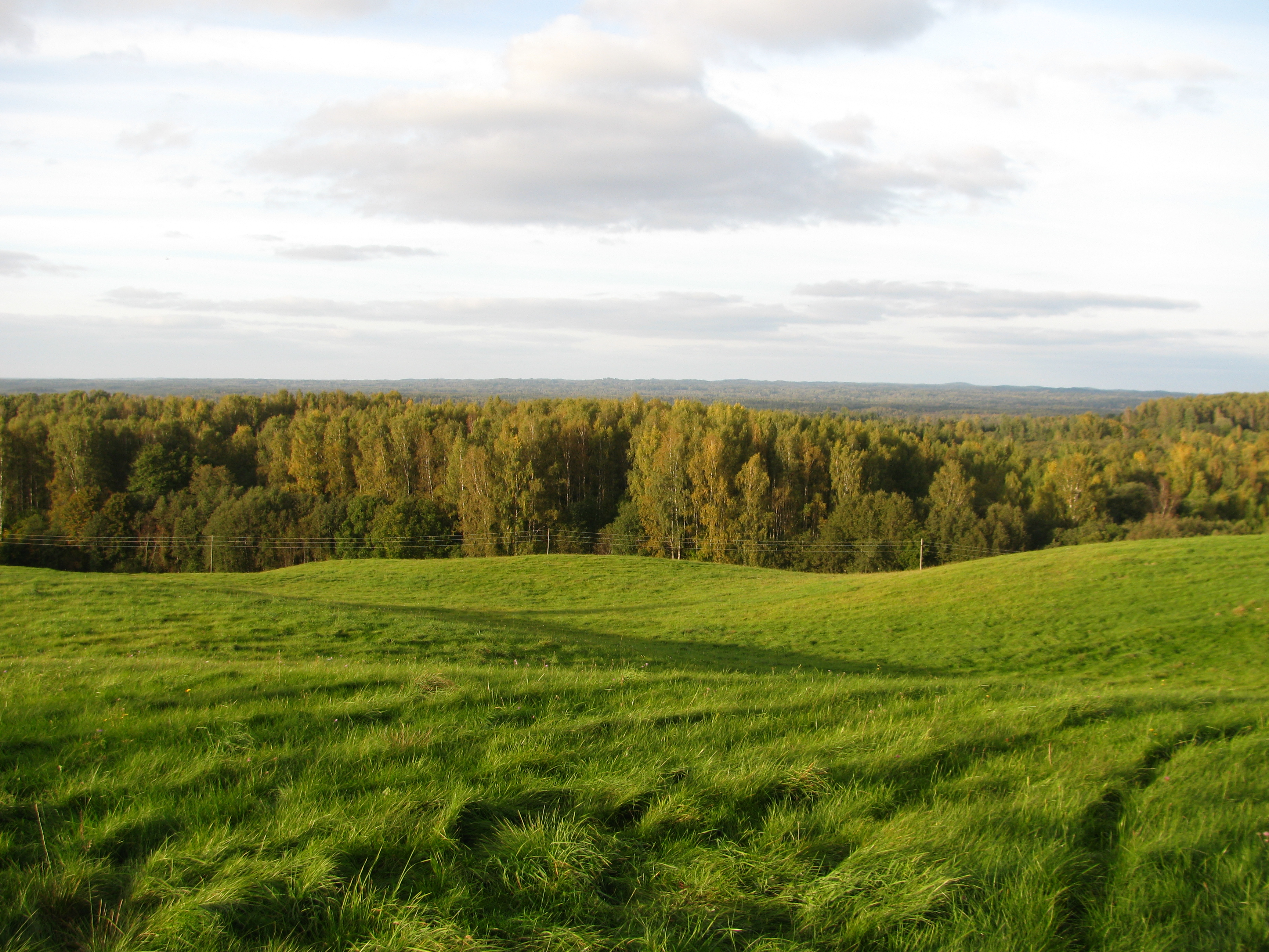 Drusku (Kornetu) kalns, Veclaicenes pagasts